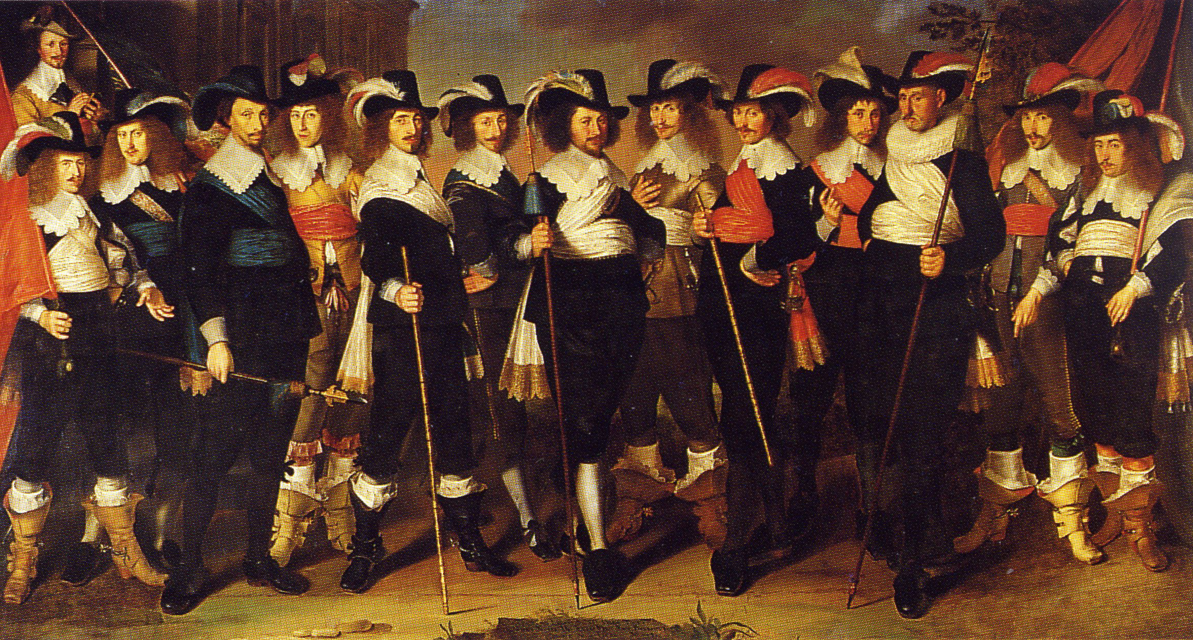 Officieren van de schutterij o.l.v. kolonel Harmanus Herbertsz.